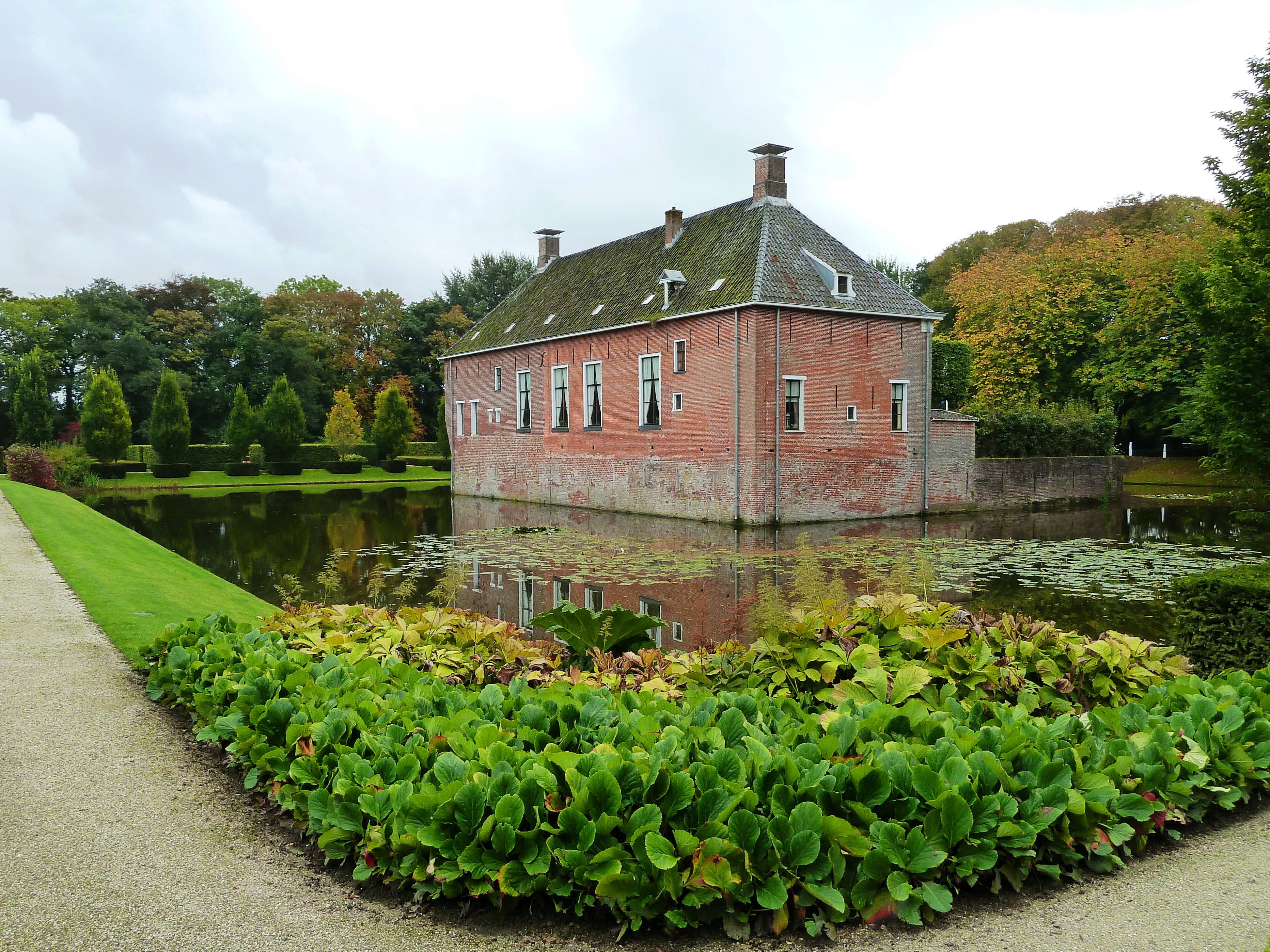 Borg Verhildersum, schuin van achteren.